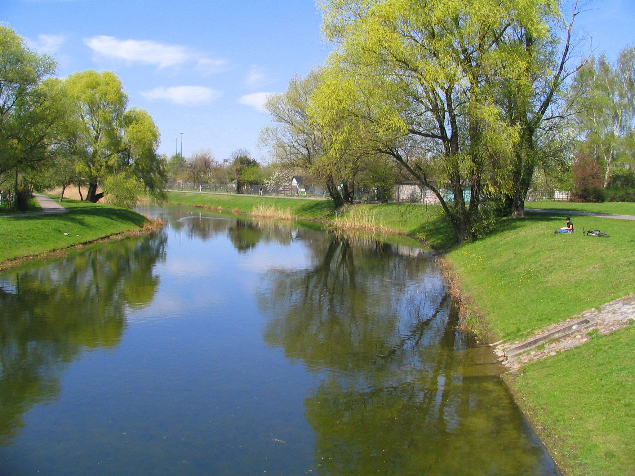 Warszawa - Marymont - Kępa Potocka